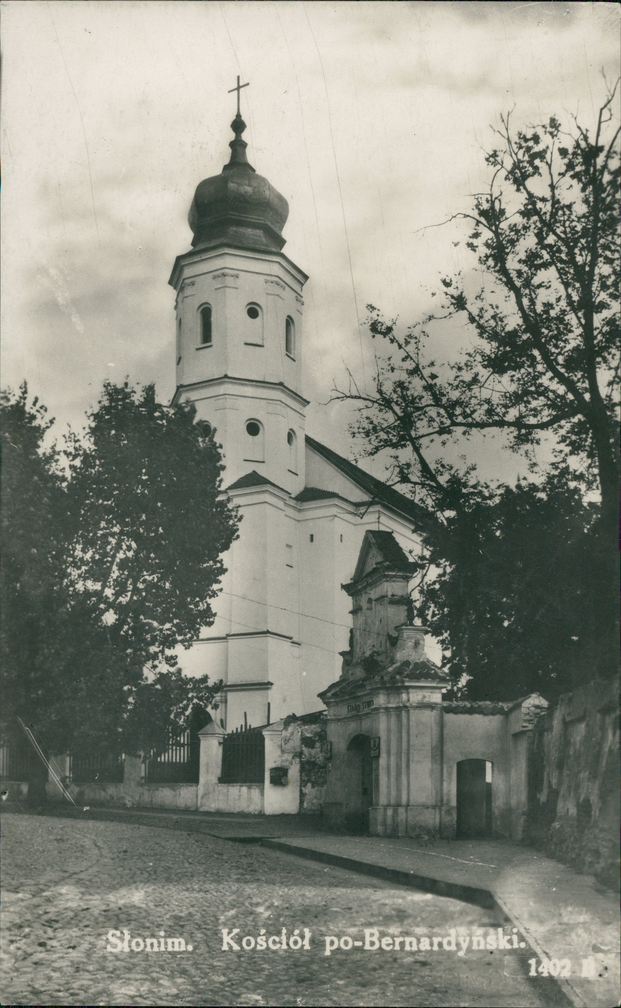 Беларуская (тарашкевіца): Слонім (Słonim), вуліца Бэрнардынская (vulica Bernardynskaja). Касьцёл Найсьвяцейшай Тройцы і кляштар бэрнардынаў